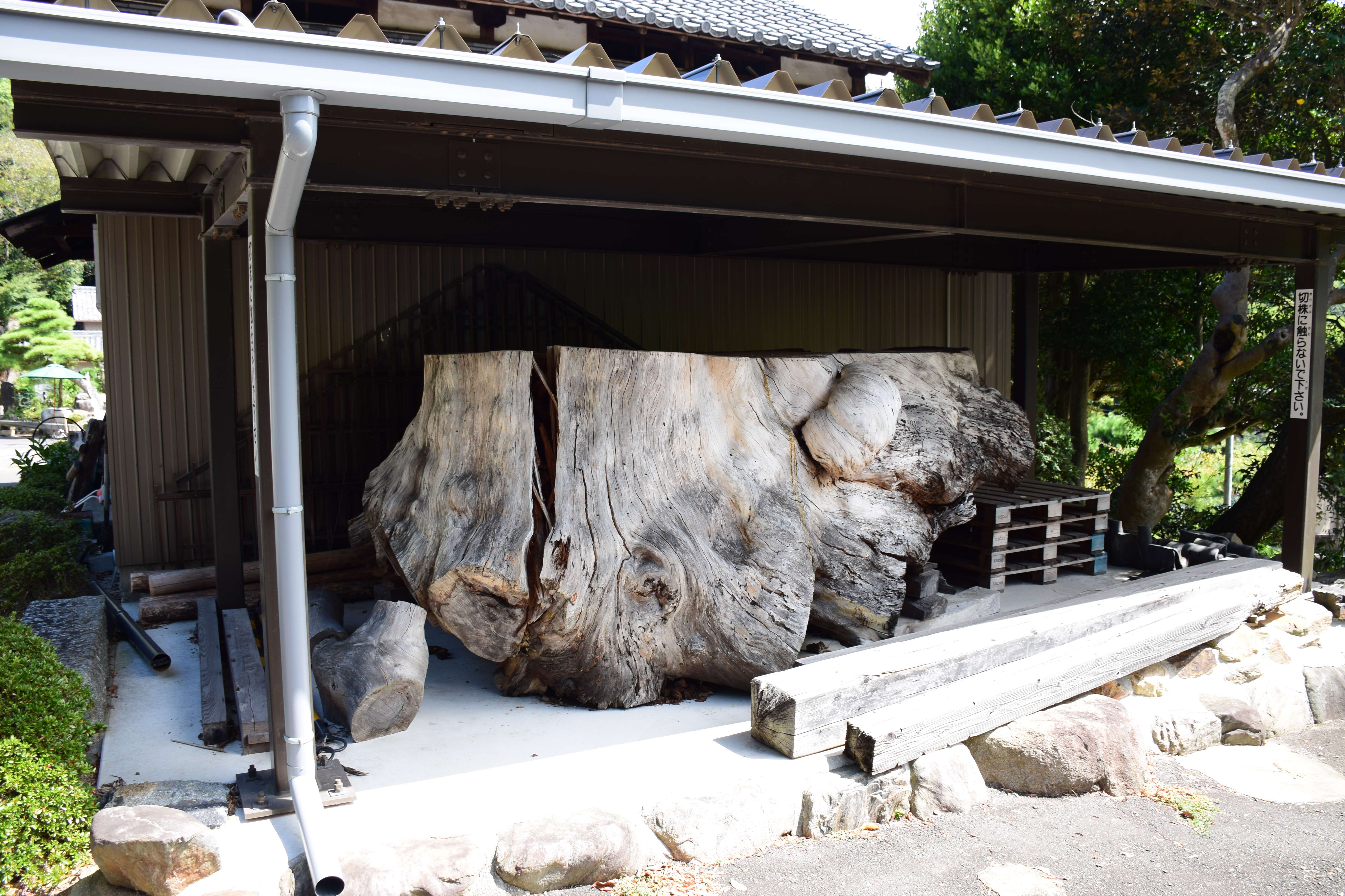 足利誓いの松